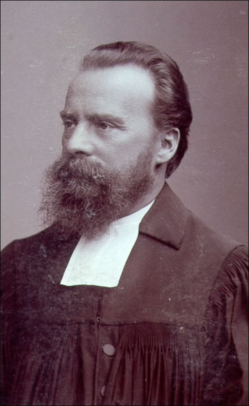 Hermann von Soden (1852-1914), German Biblical scholar